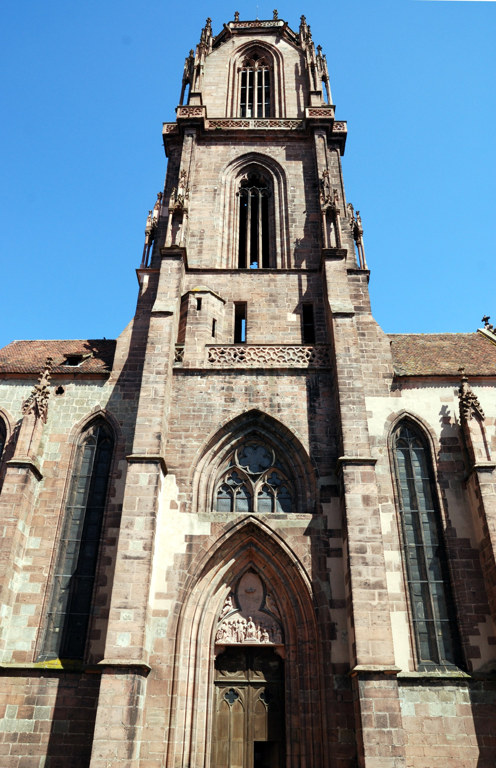 St.-Georgs-Kirche Sélestat: Kirchturm